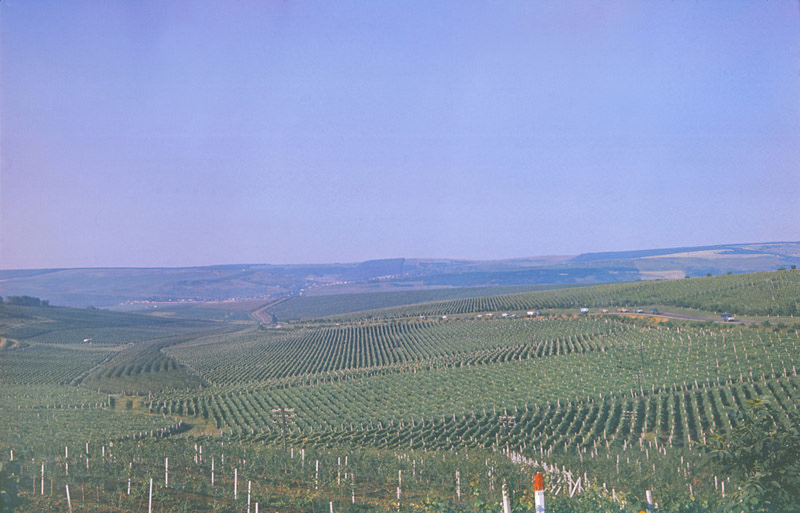 Vineyards in Dănceni, Ialoveni District, Moldova (1980)